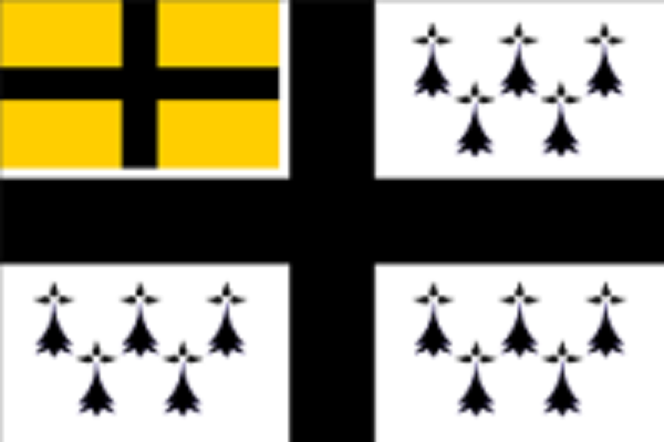 Nouveau drapeau du Pays de Retz, non officialisé encore